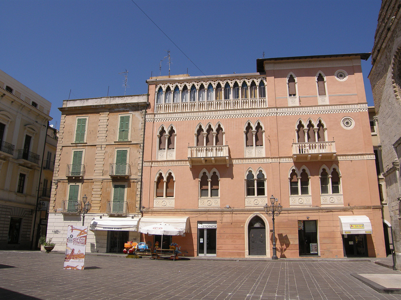 Vasto